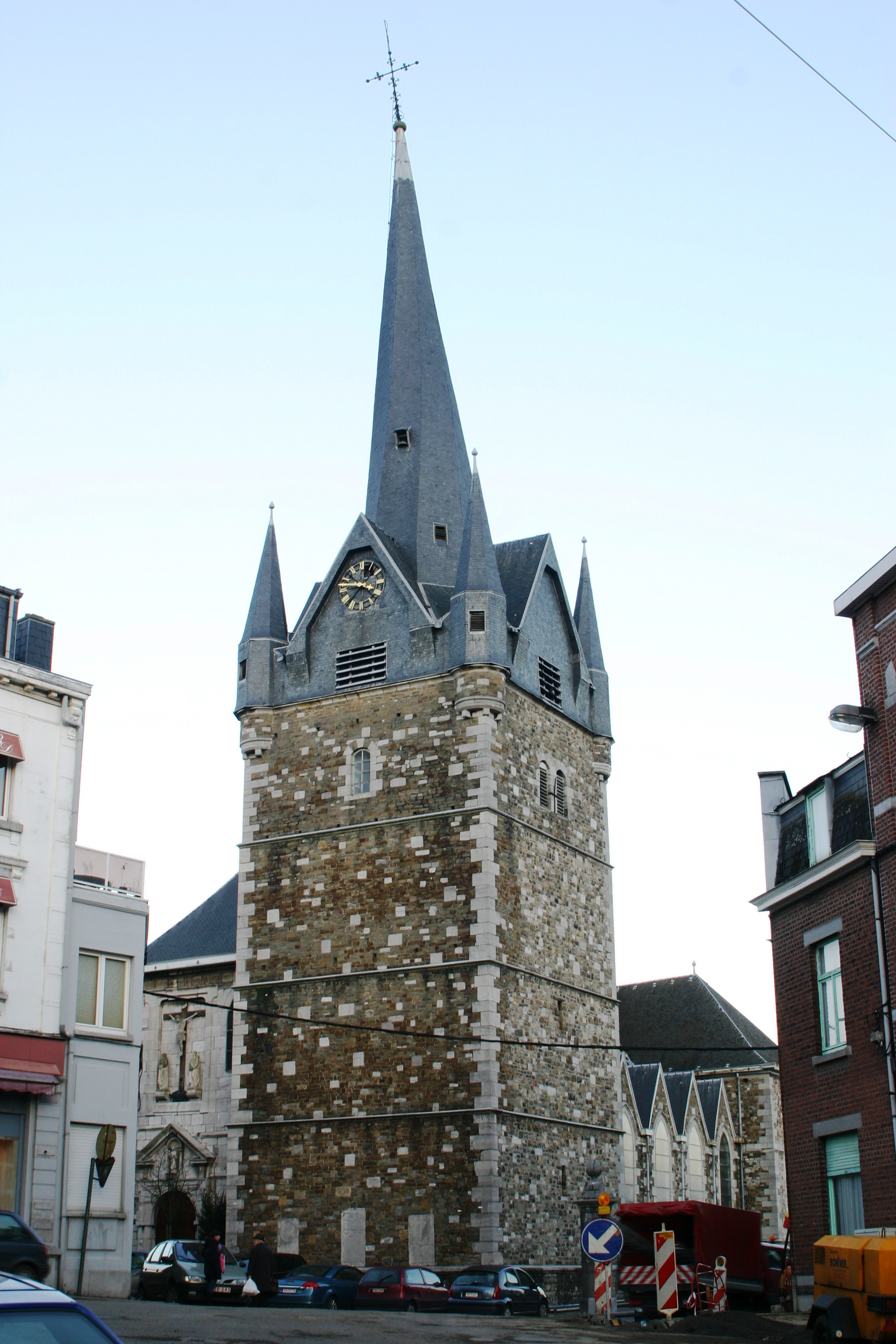 Verdréinte Kierchtuerm zu Herve.